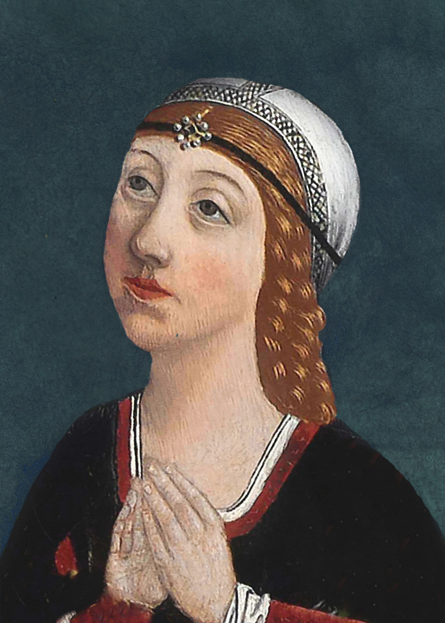 Infanta Isabel de Trastámara.